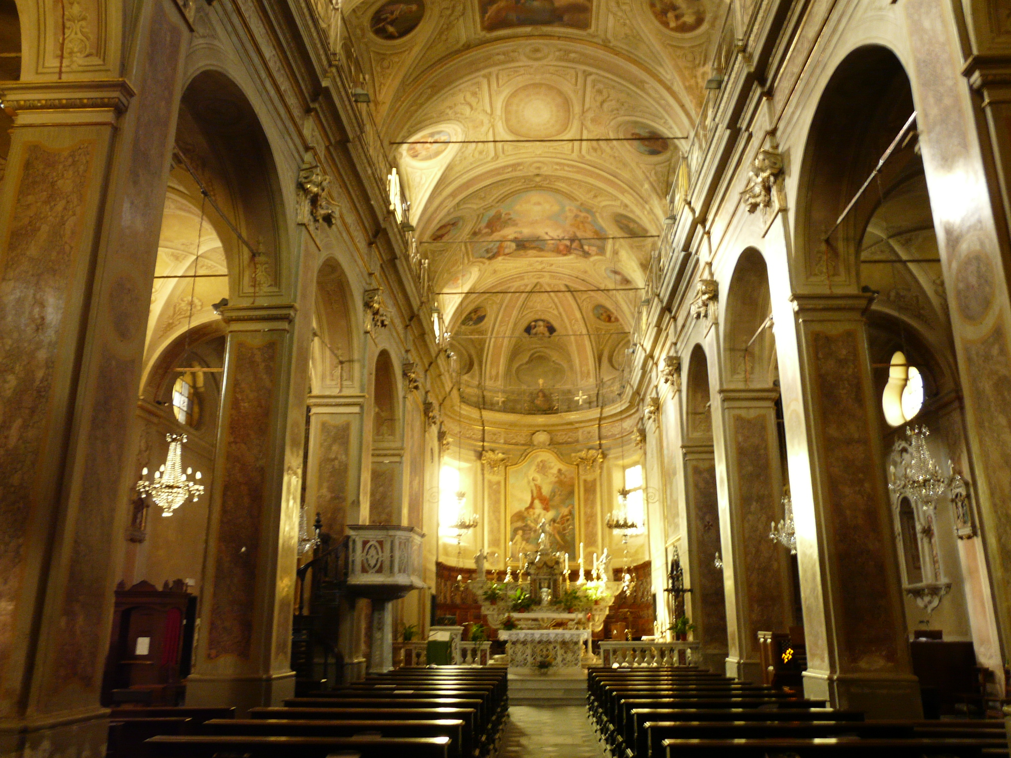 Chiesa di Santa Maria e San Lorenzo Calizzano, Liguria, Italia